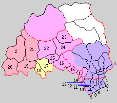 高知県吾川郡の町村制時点の町村。